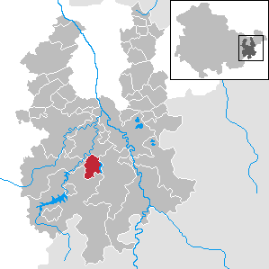 Hohenleuben in Thuringia - District Greiz